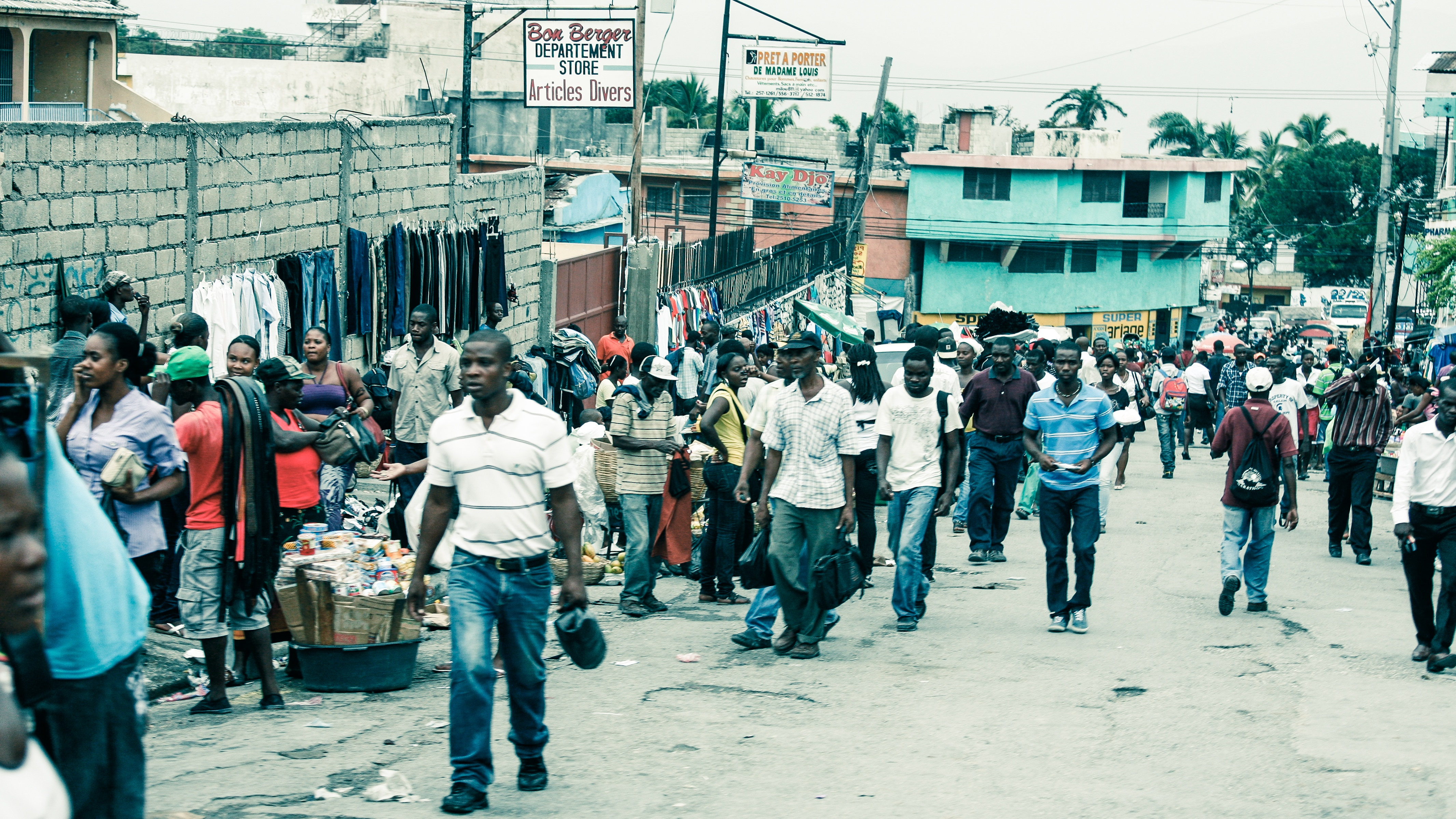 Port Au Prince, Haiti